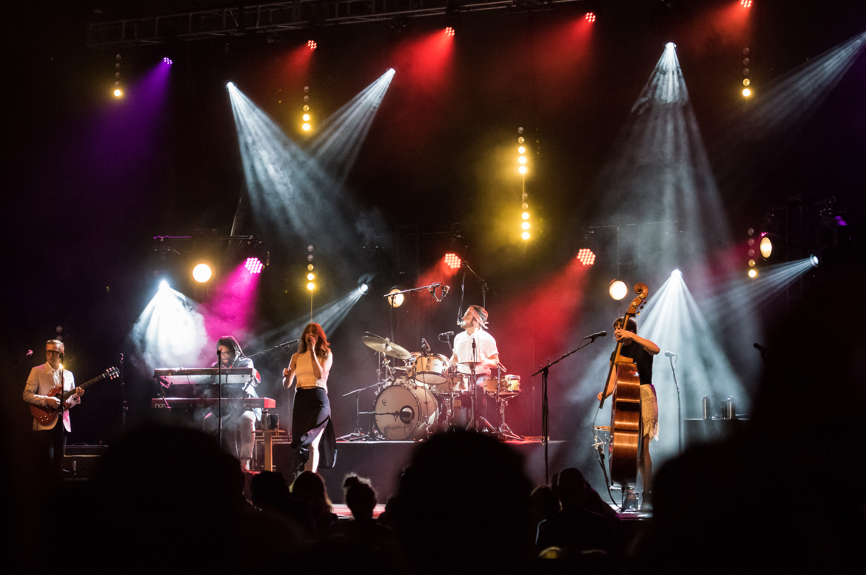 Lake Street Dive @ BRIC Celebrate Brooklyn! Festival - June 7, 2017 Prospect Park Bandshell Brooklyn, NY